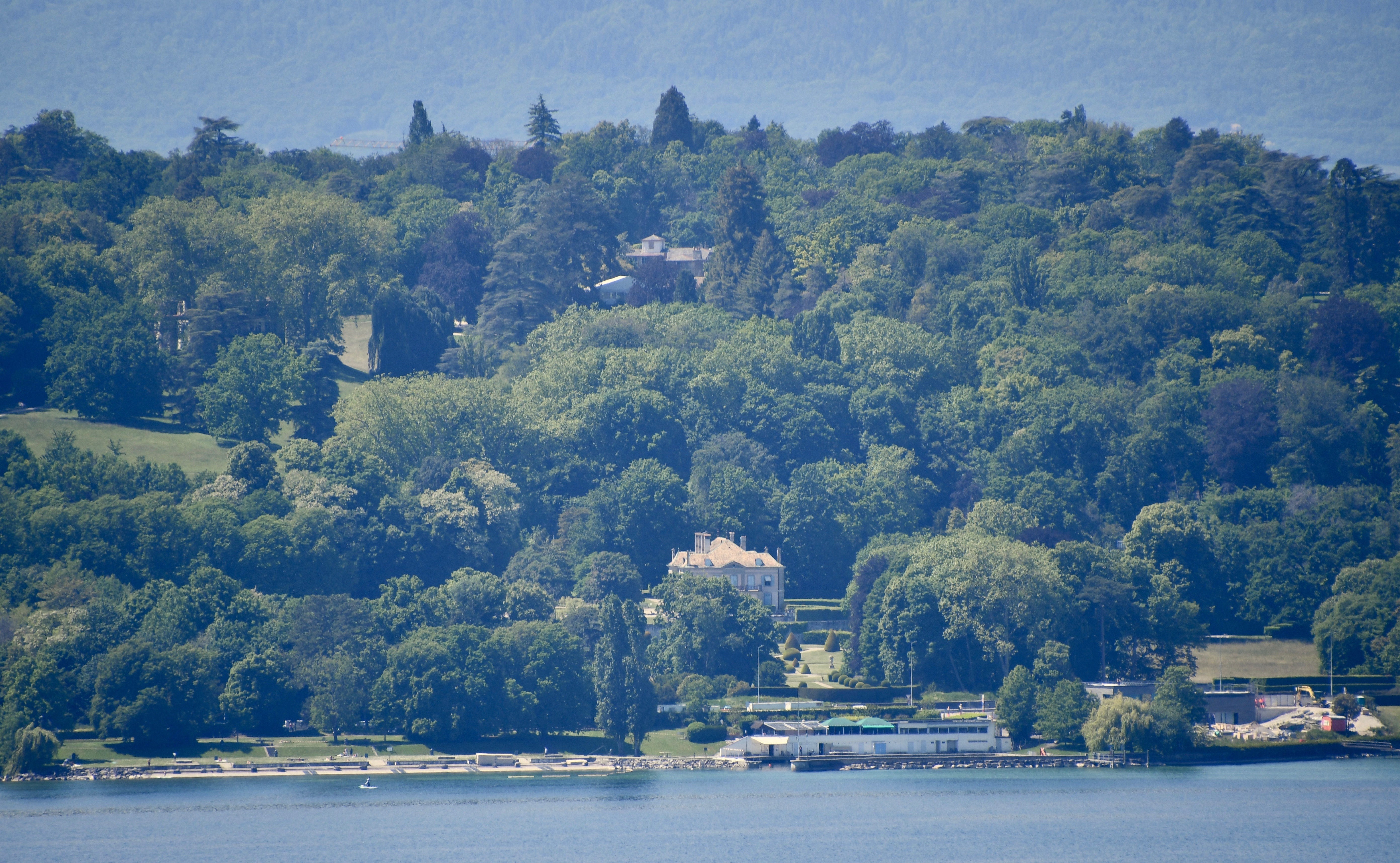 L'ile Calvin et le château du Reposoir depuis Cologny.